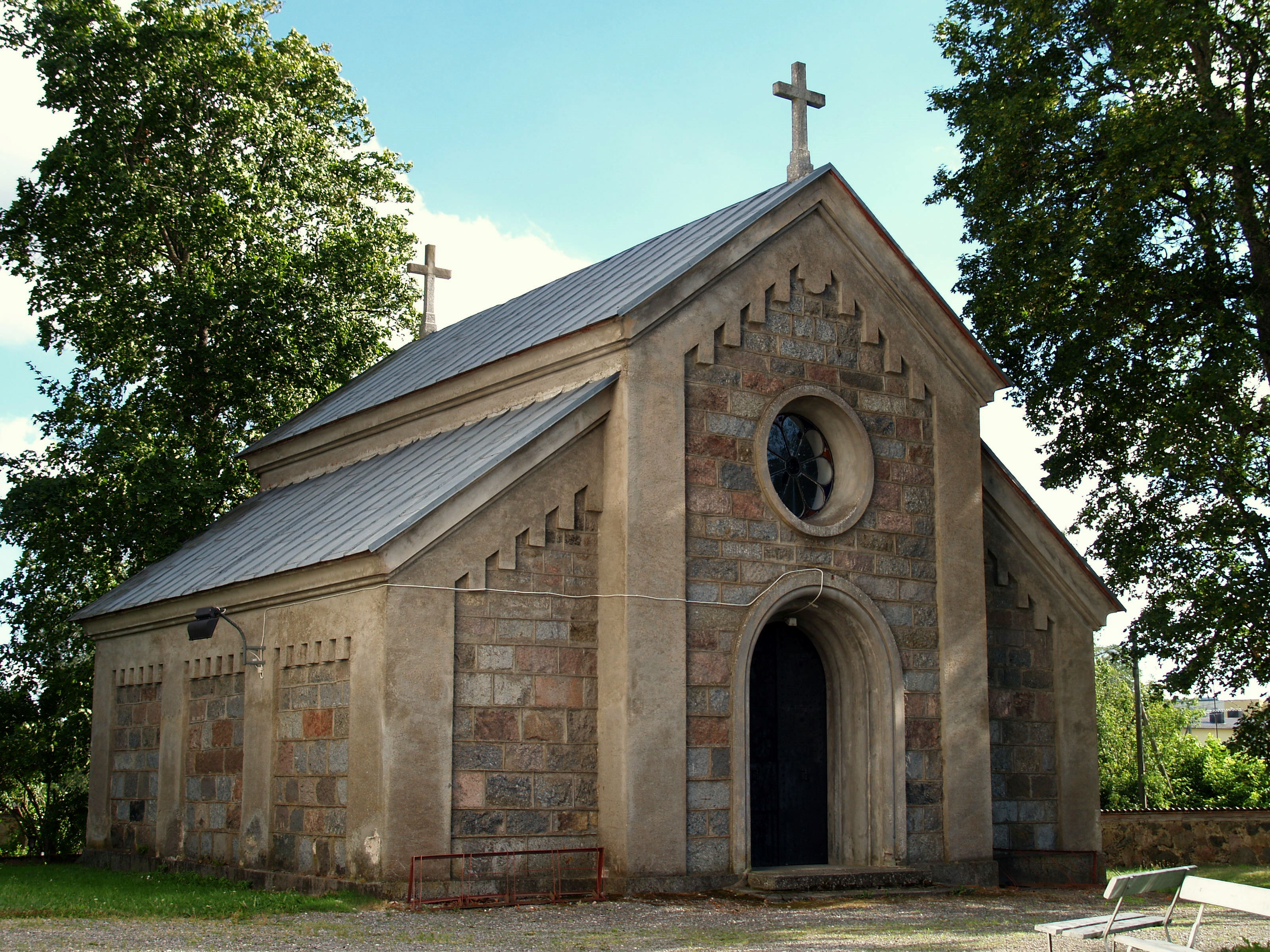 Kose kiriku juures paiknev uuem kabel, mis on Ravila mõisniku Paul von Kotzebue kingitus Kose kirikule (valmis 1898).